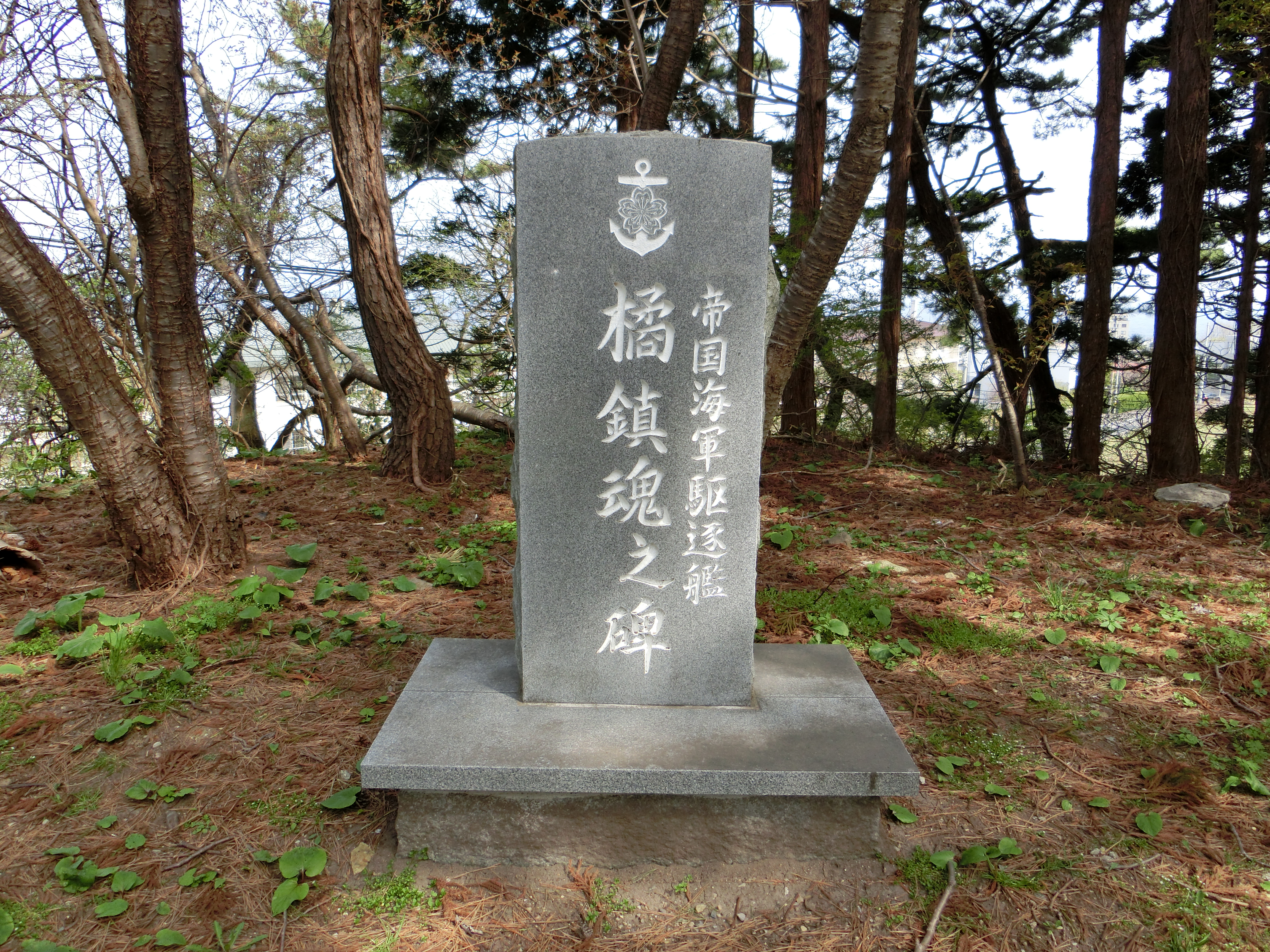 函館護国神社にある駆逐艦「橘」の慰霊碑